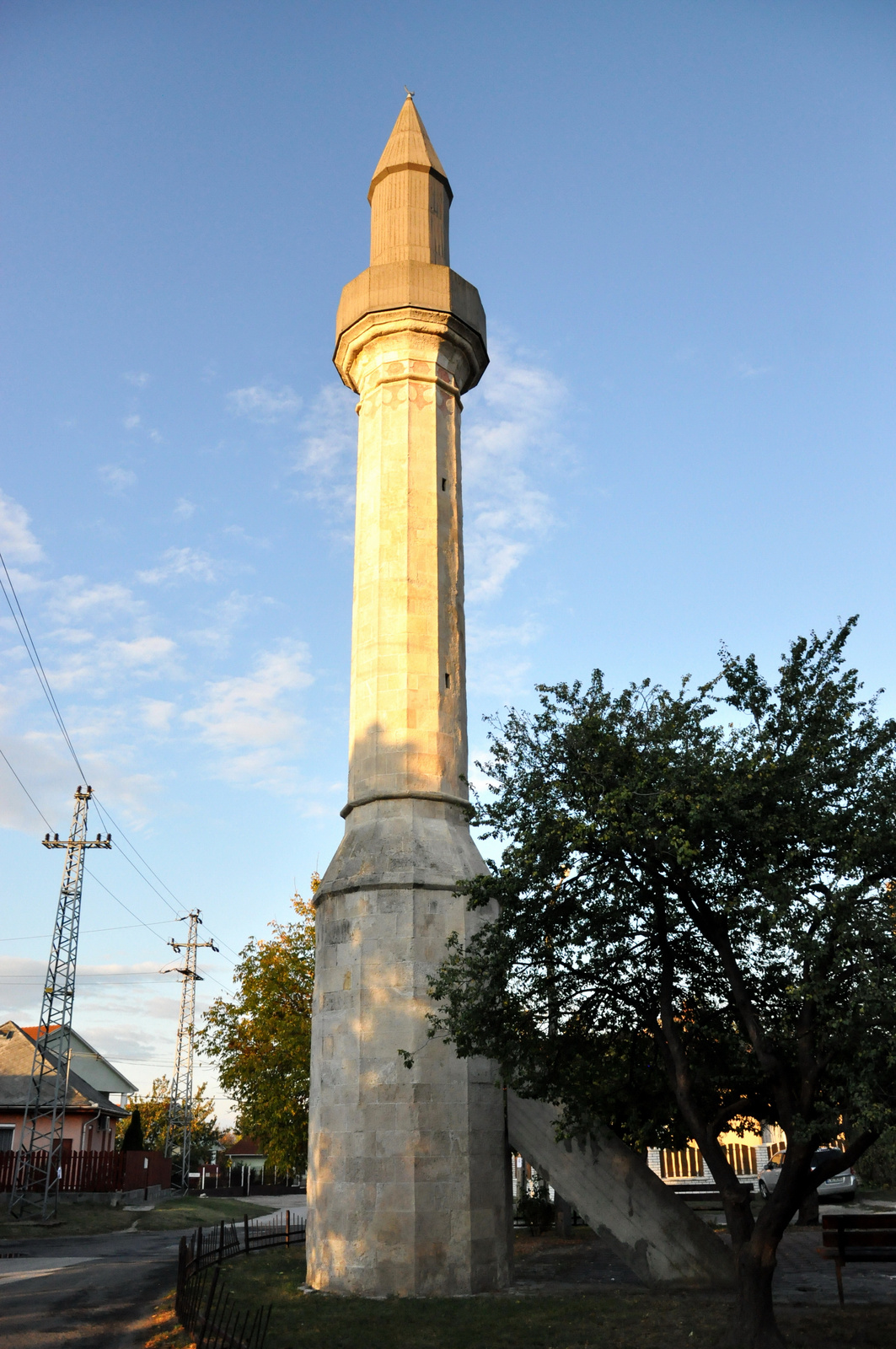 Minaret (Érd, Mecset u.) This is a photo of a monument in Hungary, Identifier: 7014